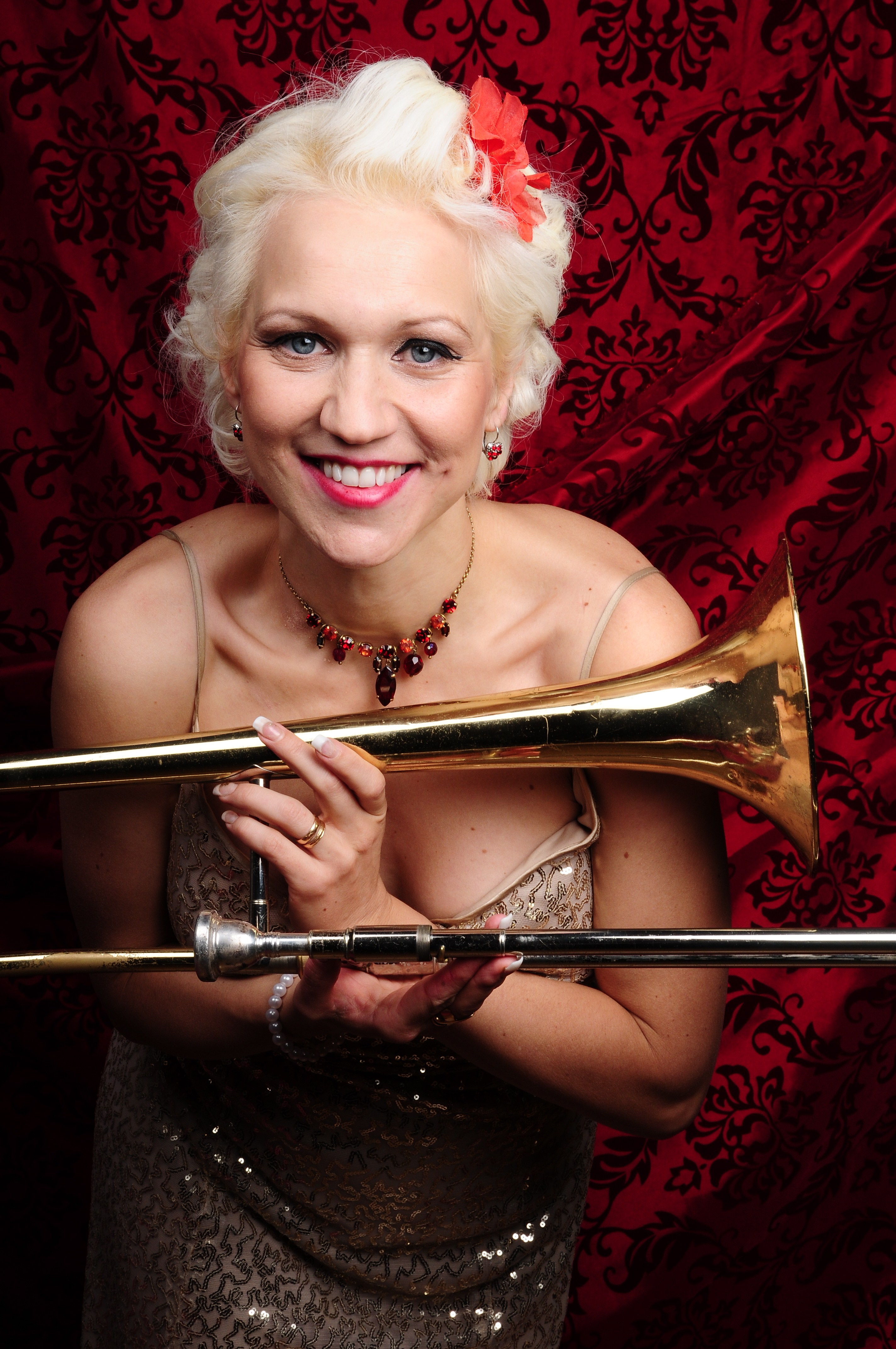 Jazzmusikern Gunhild Carling.